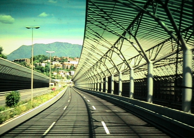 Fotis: Ella Strug, 19-24/5/2005. Donis permeson por kopii la diapozitivon por publikigo en Vikipedio al Biciklanto 14:05, 25. Nov 2005 (UTC)